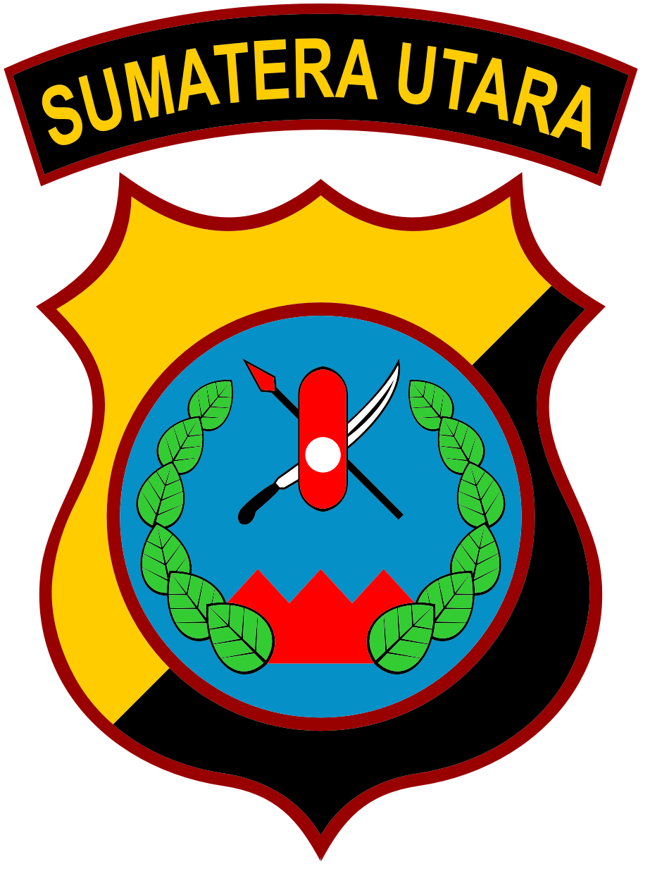 Gambar ini adalah Lambang Kepolisian Daerah Sumatera Utara